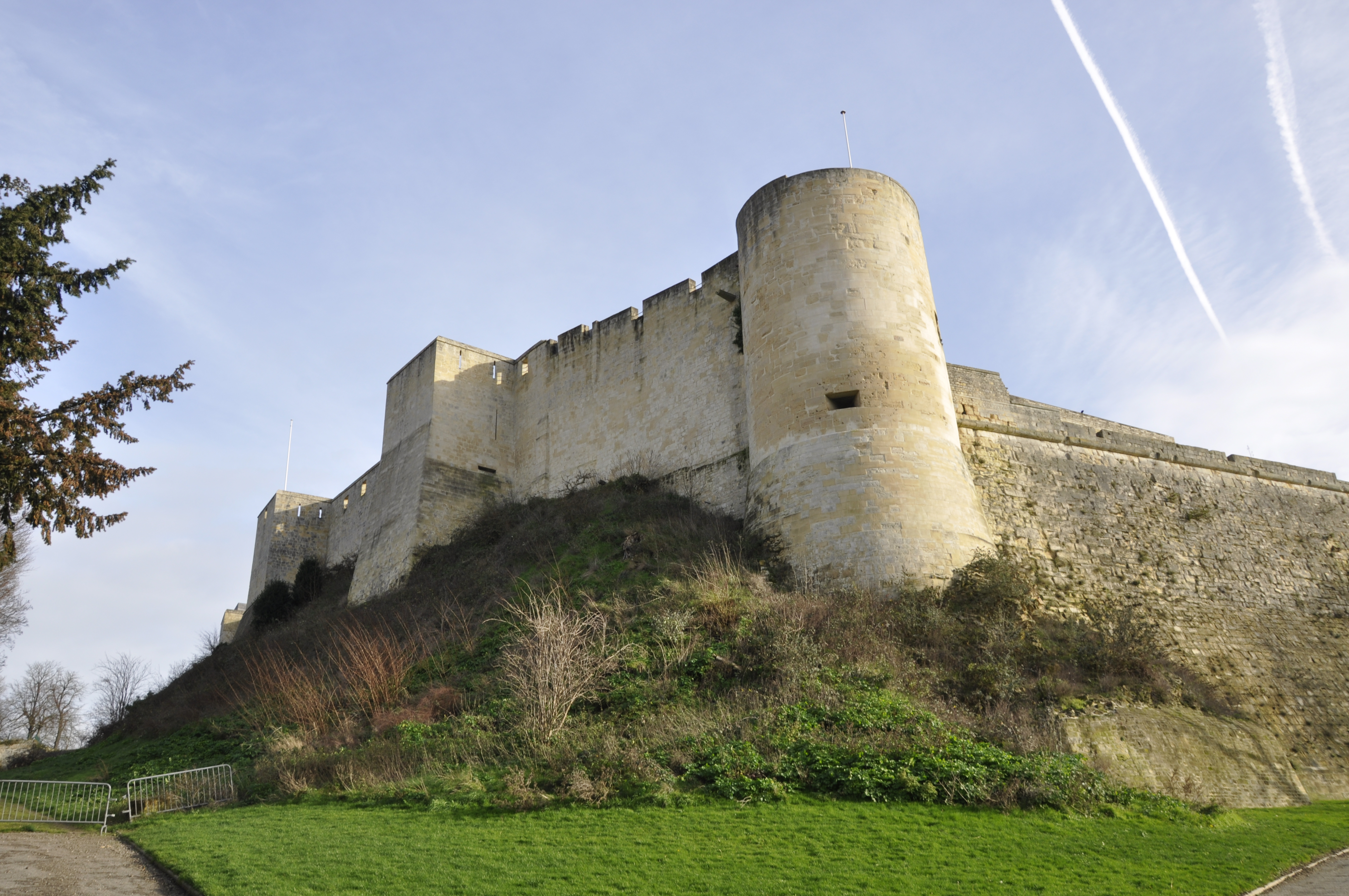 La tour Puchot du château de Caen